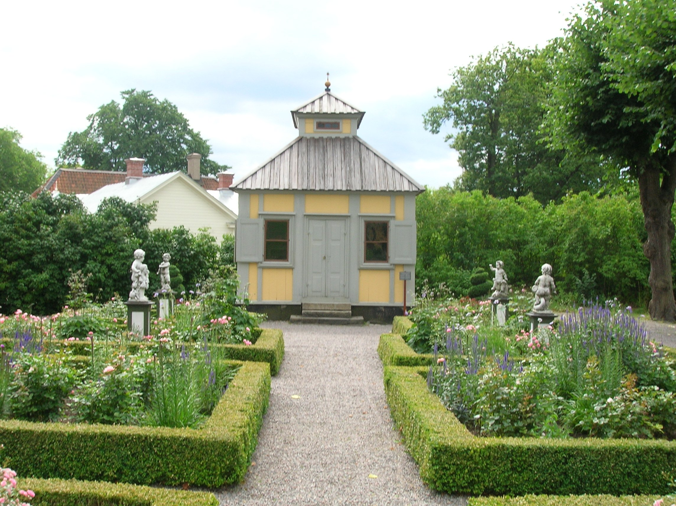 Emanuel Swedenborgs lusthus, Skansen, Stockholm, Sweden.